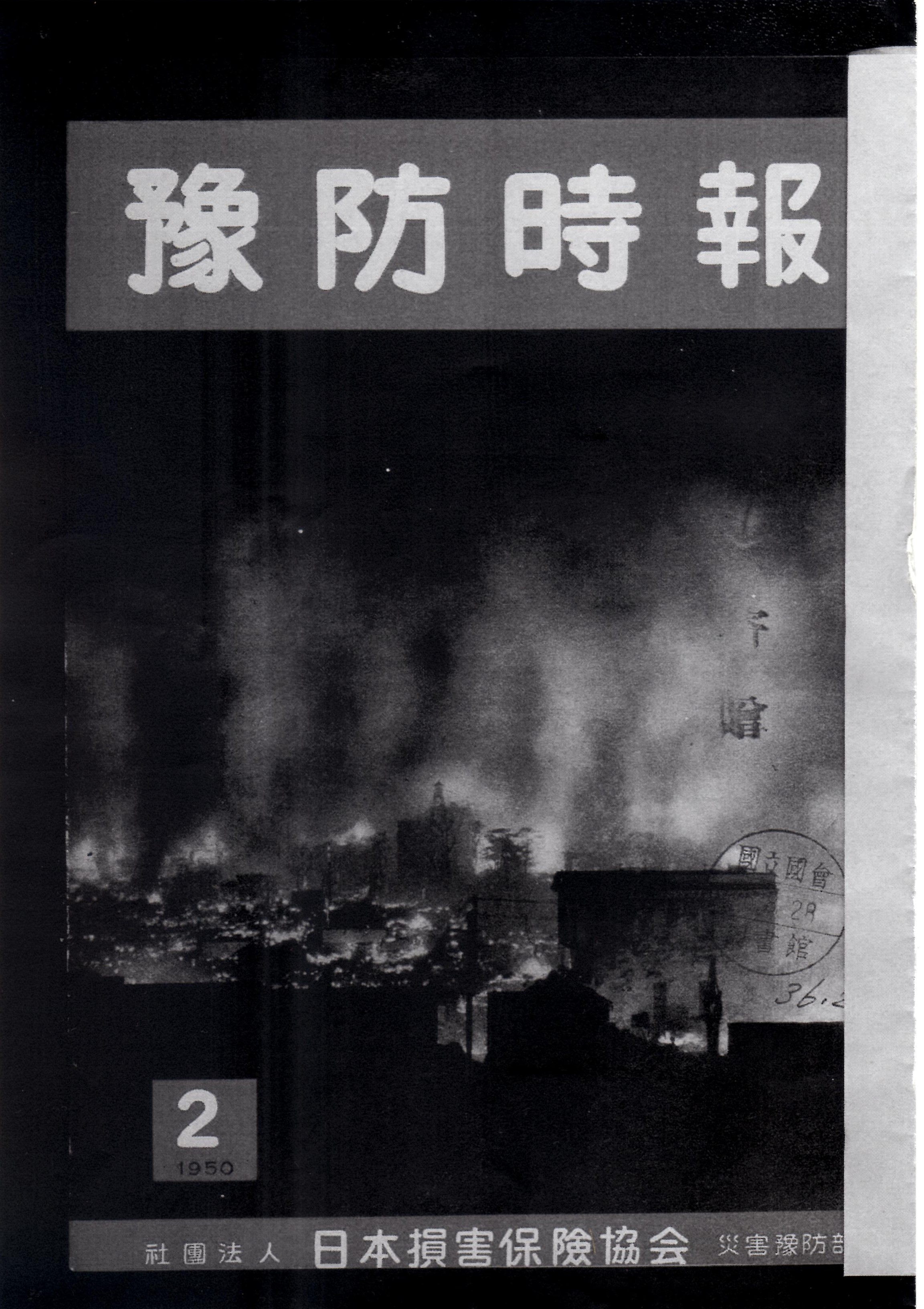 『予防時報』第2号表紙。静岡県熱海市で1950年4月に起こった「熱海大火」の様子。